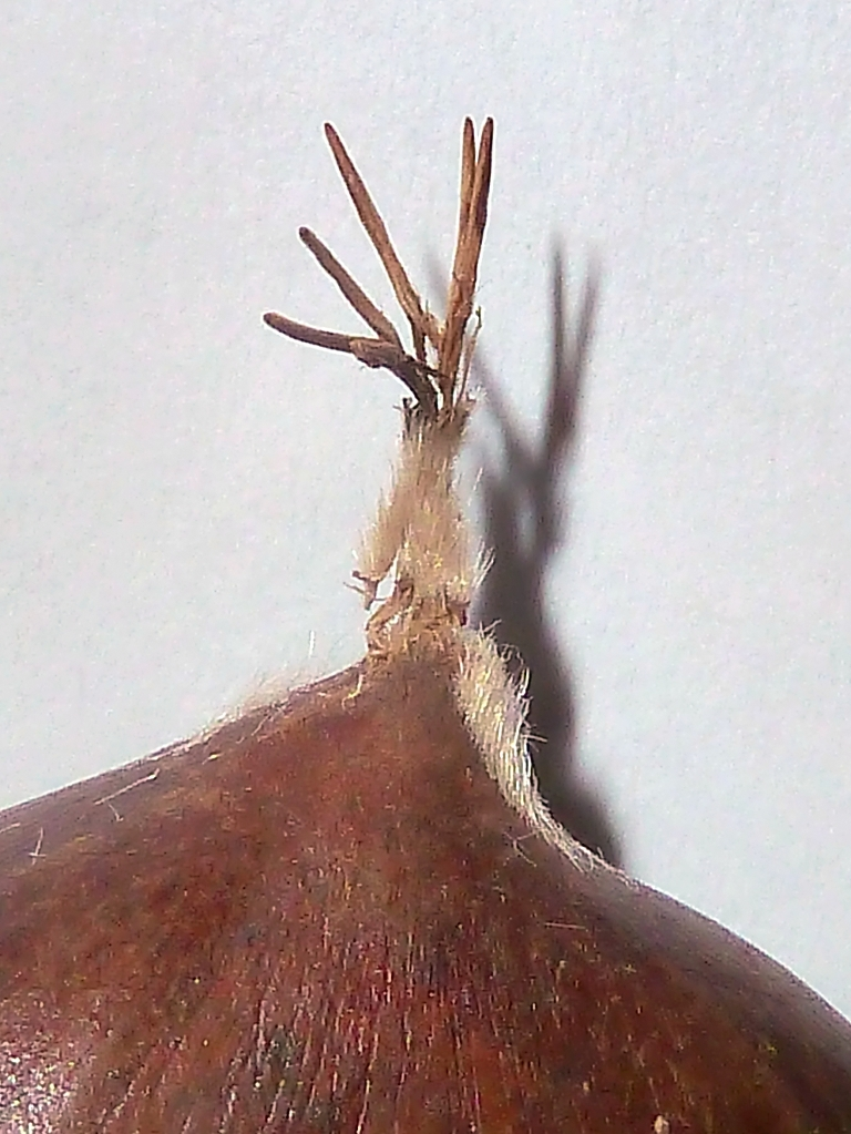 Castanea sativa cv. "Nigral" (Castaño común) : Aquenio maduro con su pistilo y sus estilos persistentes, detalle - Origen, Villafranca del Bierzo (Provincia de León), comercio, Madrid (España).